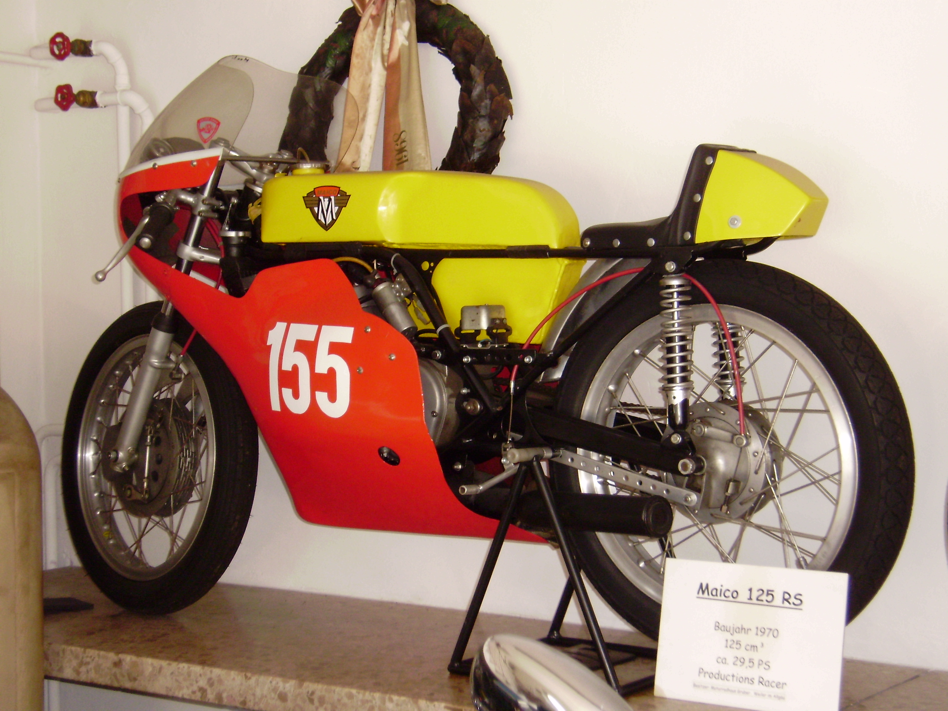 Toni Grubers Rennmotorrad Maico 125 RS („Schwabenpfeil“ bzw. „Die gelbe Gefahr“), 125 ccm, ca. 29,5 PS, aus dem Jahr 1970, ausgestellt im Rennsportmuseum des Autohauses Gruber in Weiler im Allgäu